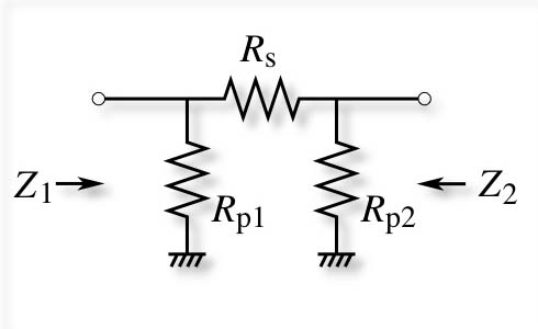 Pi type unbalanced attenuator circuit